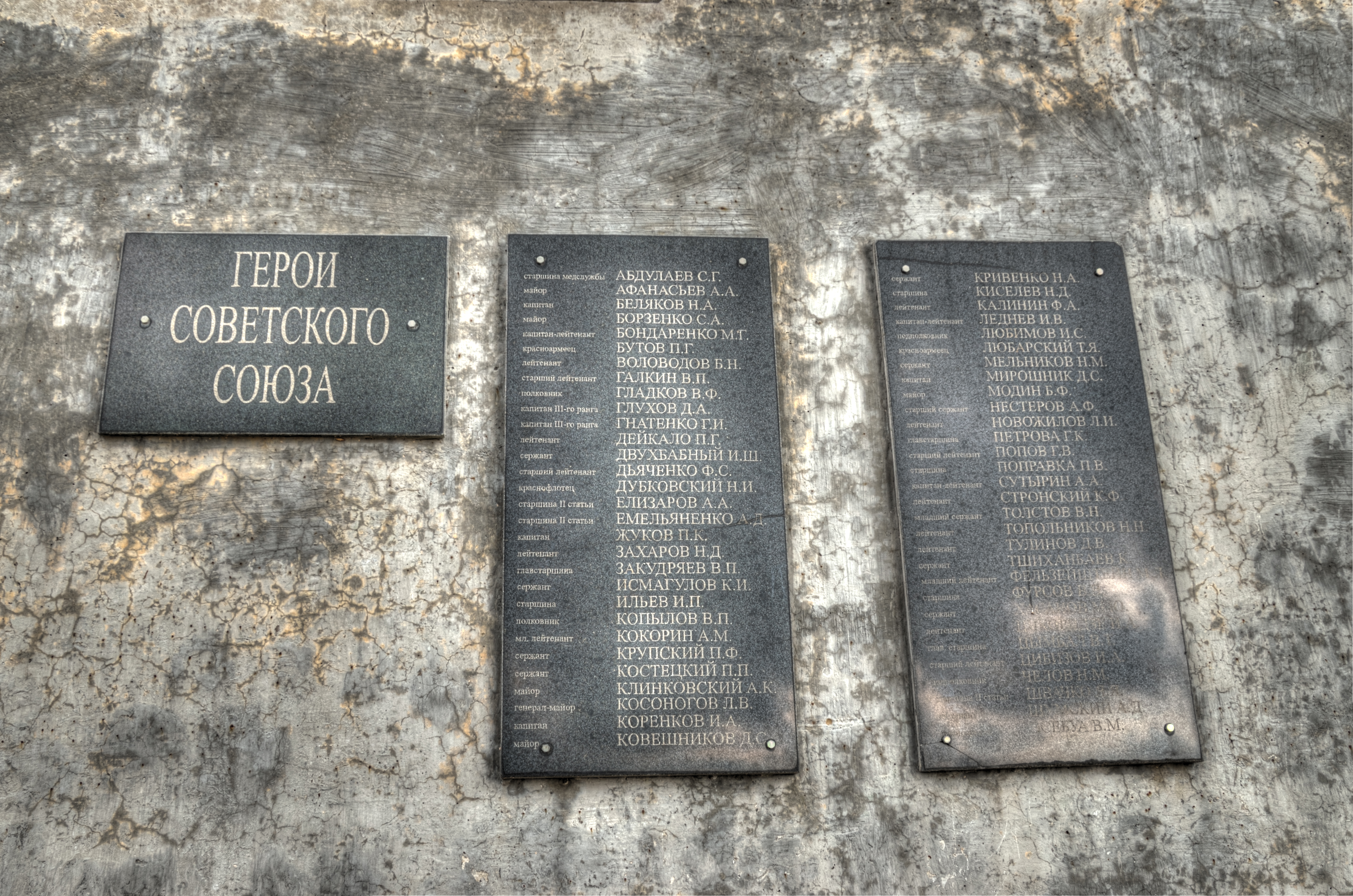 меморіальний комплекс «Героям Ельтігенського десанту». Дата подій: 1943 р. Дата споруди: 1985 р., Керч, вул. Галини Петрової, район Ельтиген